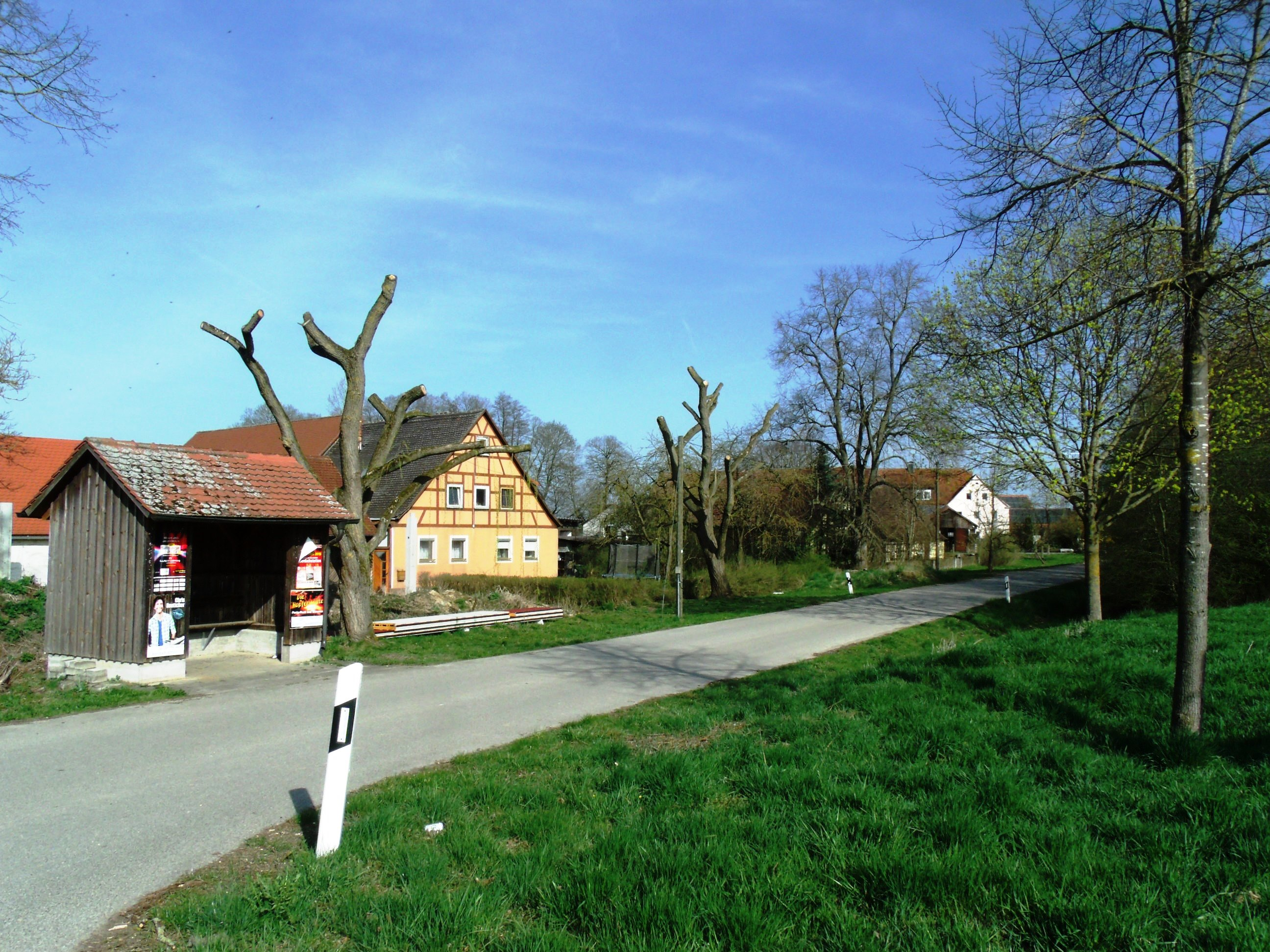 Bauzenweiler, Ortsteil von Leutershausen im Landkreis Ansbach, Ortsstraße